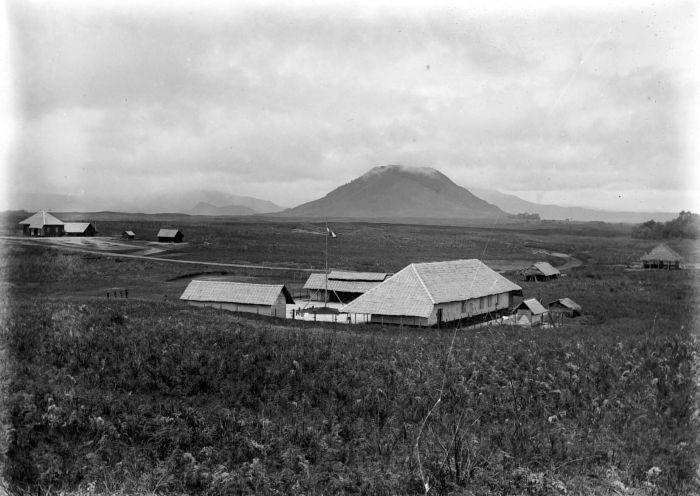 Negatief. De kazerne en het huisje van de heer Tersteege bij Seriboedolok, Karo, Noord-Sumatra